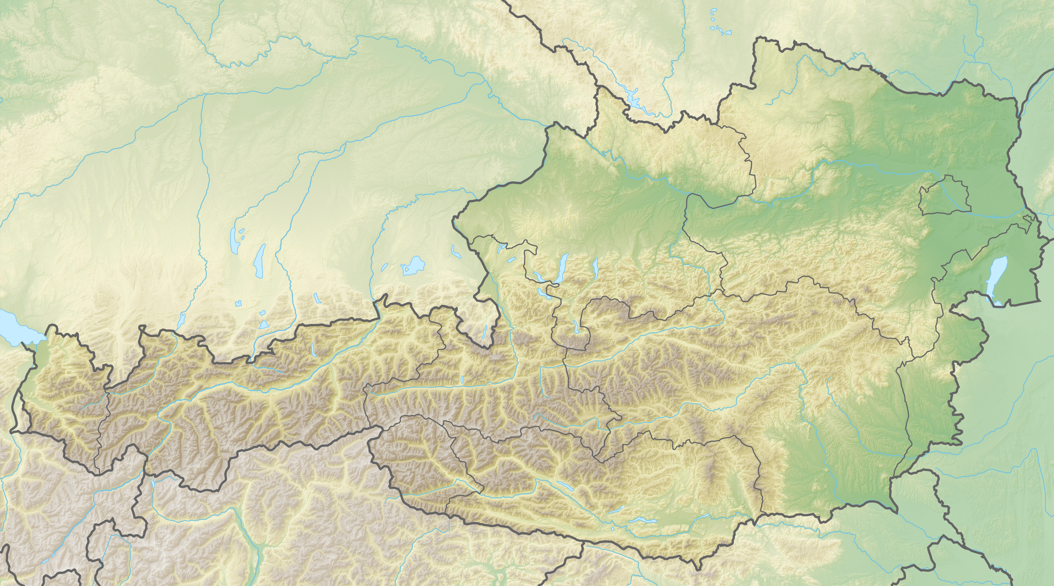 Reliefkarte Österreich Topographischer Hintergrund: NASA Shuttle Radar Topography Mission (public domain). SRTM3 v.2.